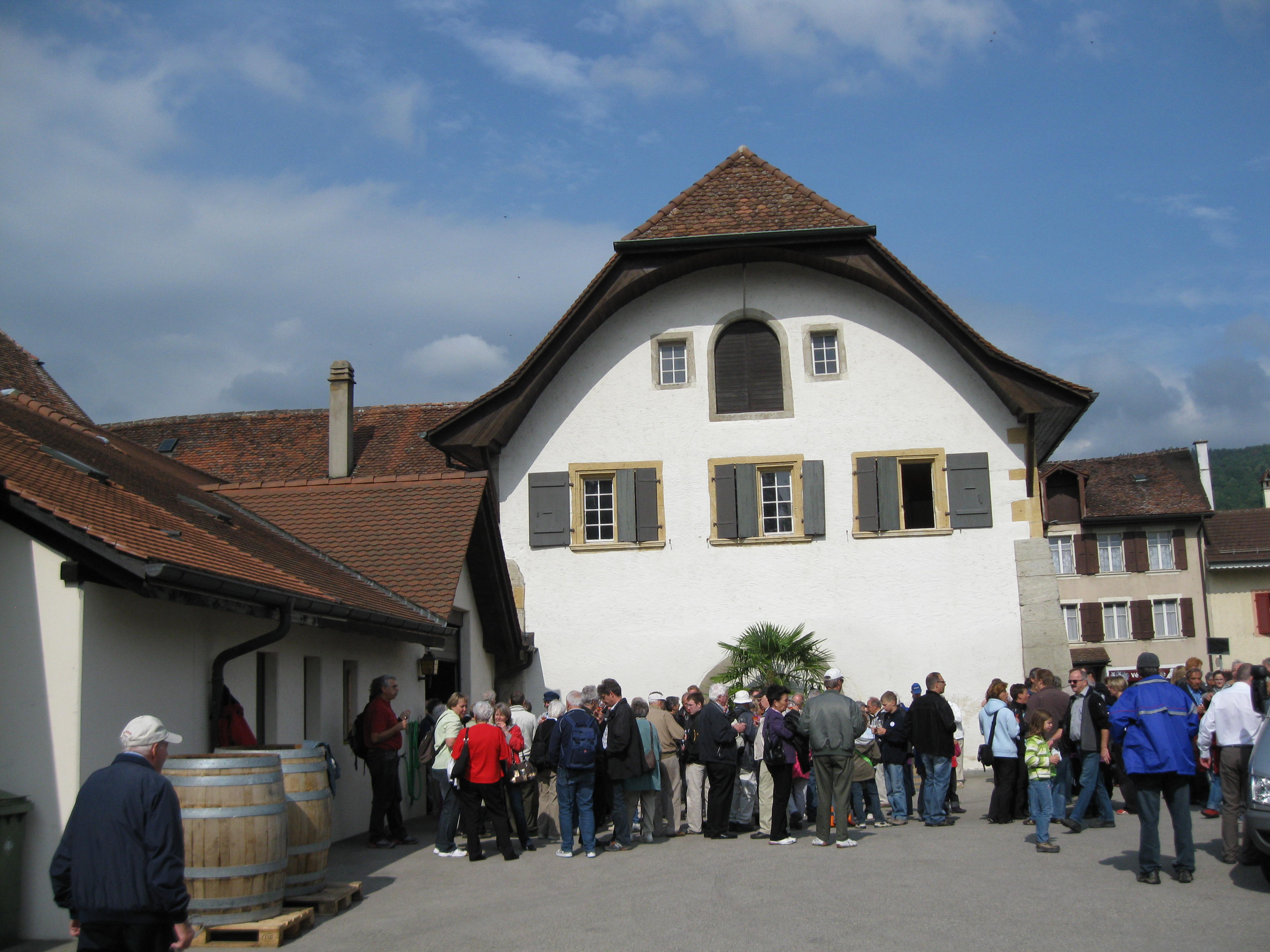 Tourismus und Wein ein wichtiger Wirtschaftsfaktor in Le landeron